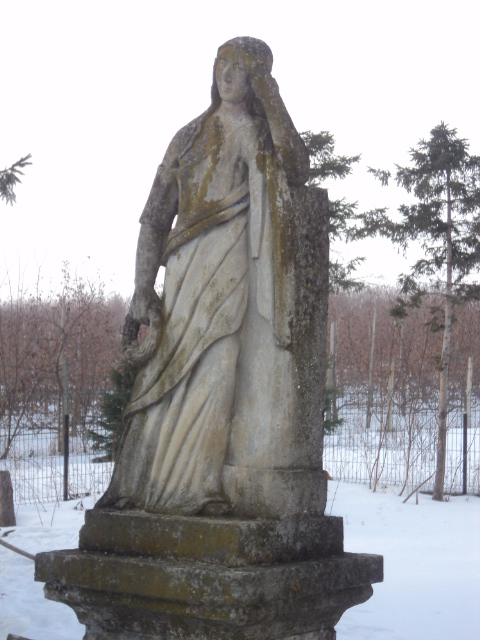 Statuia Moldova plânge din Rotopănești, județul Suceava, România.